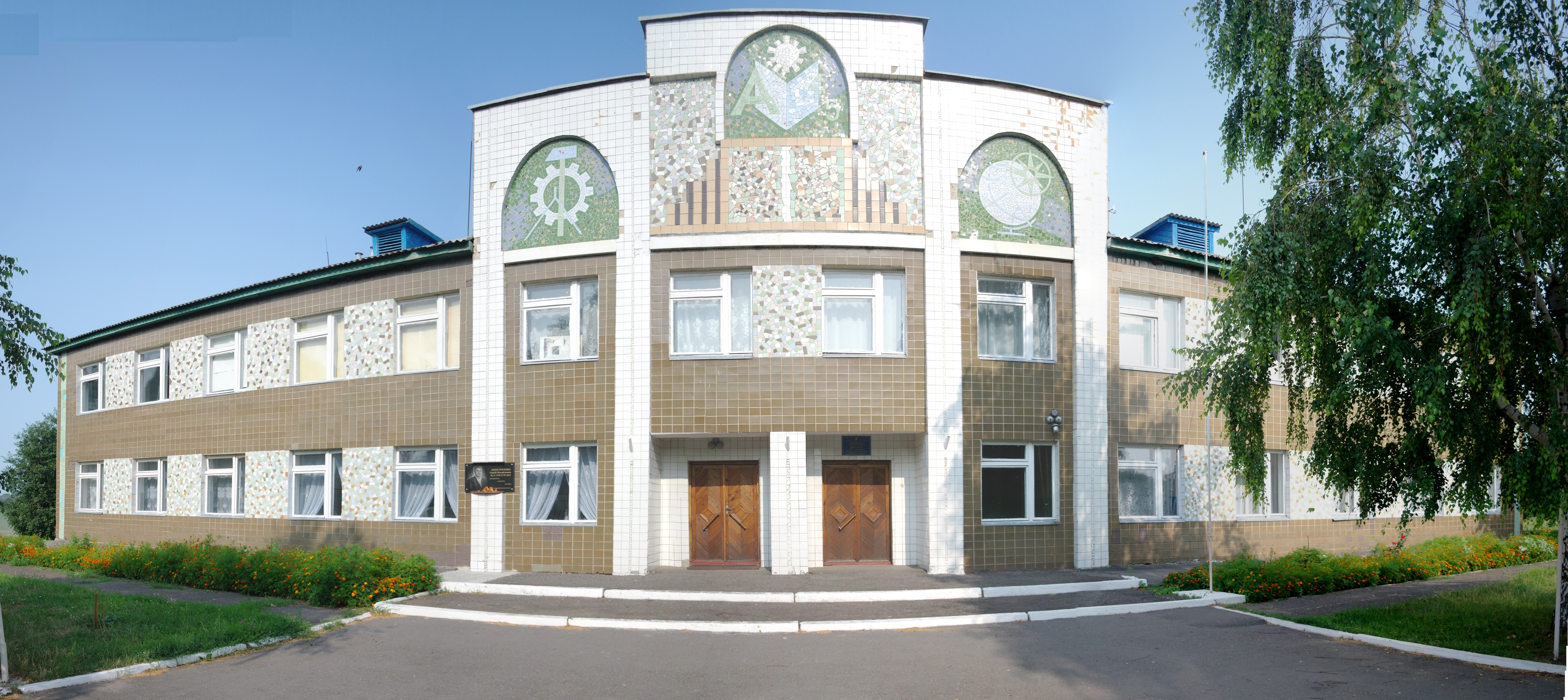 Школа 1-2 ступенів, фронтальне панорамне фото